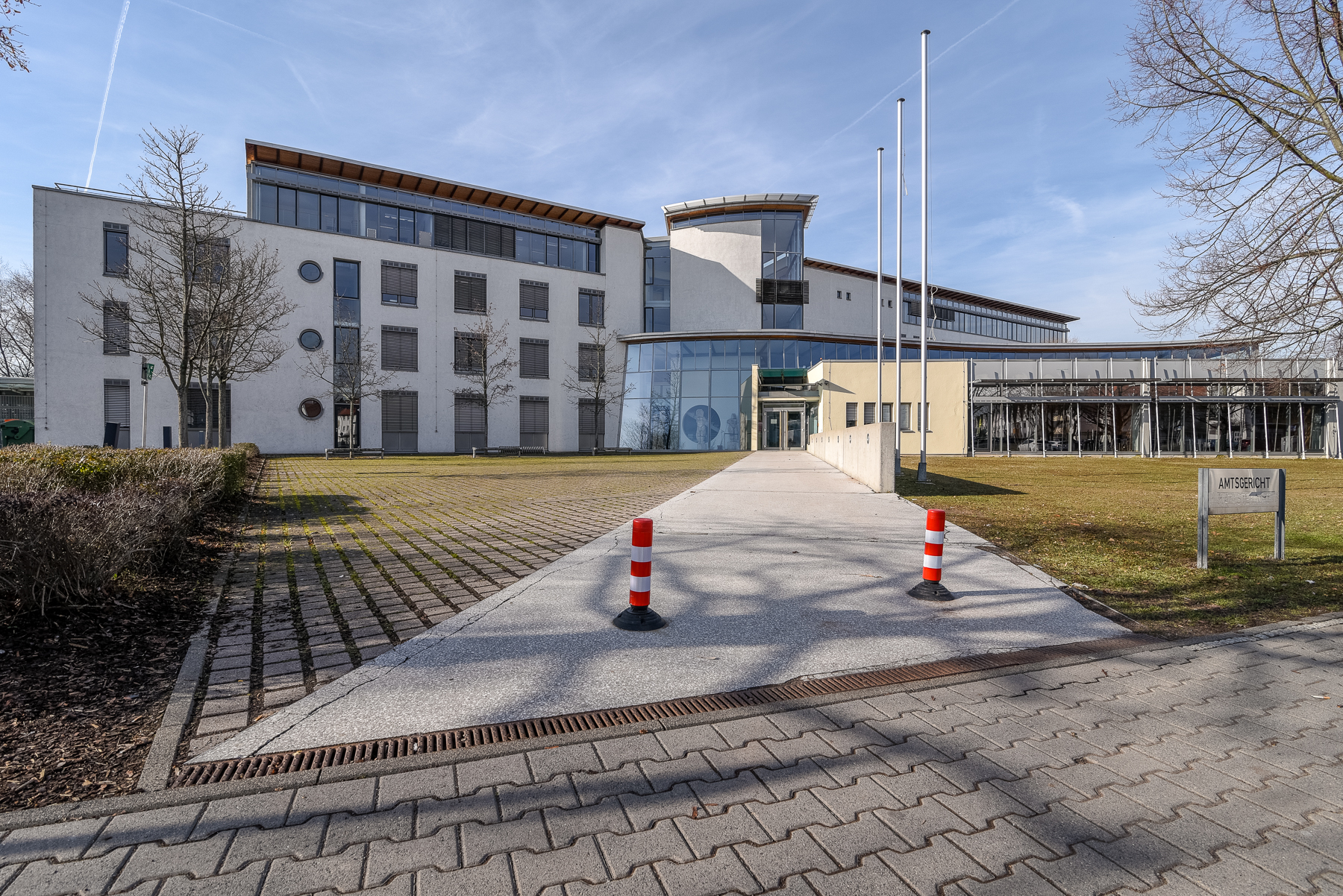 Das Amtsgericht in D-65428 Rüsselsheim